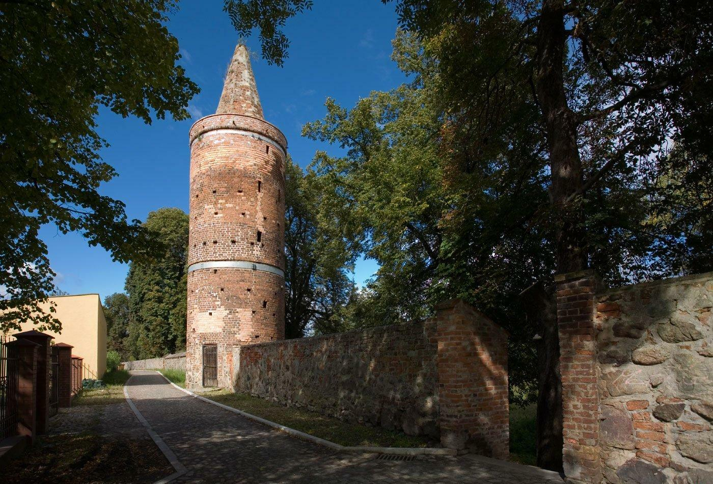 Mury miejskie wybudowano wokół Ośna w pierwszej połowie XIV wieku z kamienia polnego. Baszta złodziejska została zbudowana równocześnie z murami w XIV wieku i rozbudowana w XV wieku. W tej baszcie od średniowiecza do XVIII wieku mieściło się więzienie, a w jej pobliżu znajdowało się mieszkanie kata i miejsce straceń z szubienicą. Przy baszcie najstarsza, średniowieczna furta.